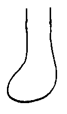 gambo clavato fungo